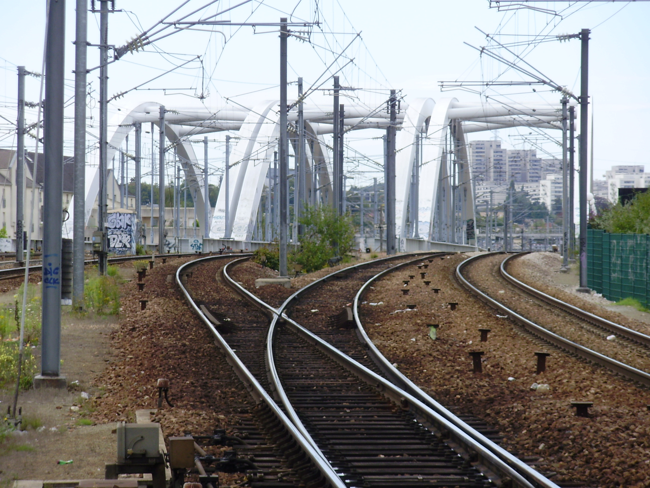 Gare de Saint-Ouen-l'Aumône, Val-d'Oise, France : pont ferroviaire sur l'Oise, vu depuis l'extrémité ouest du quai central, en regardant vers Pontoise